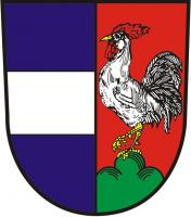 Višňové, okres Znojmo znak městysu